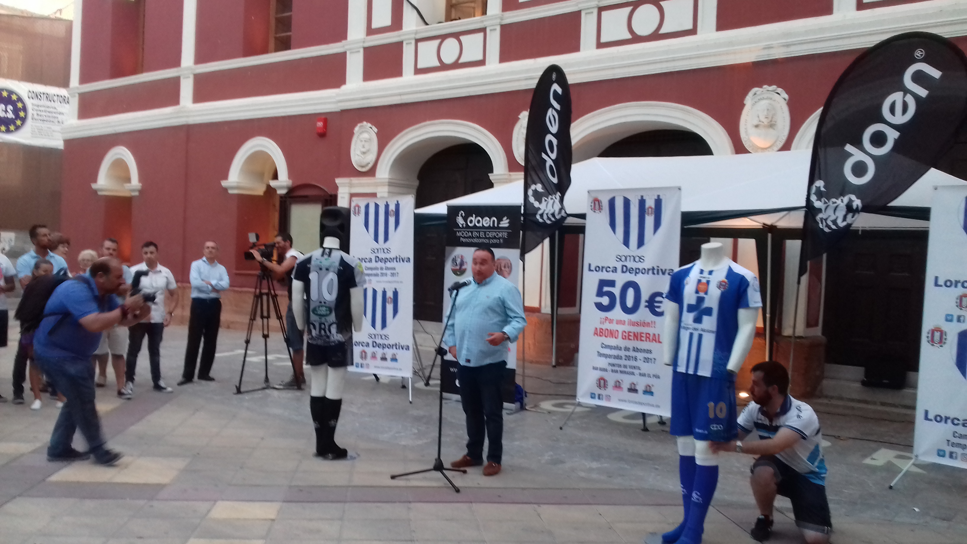 Joaquín Flores Alcázar, presidente del CF Lorca Deportiva